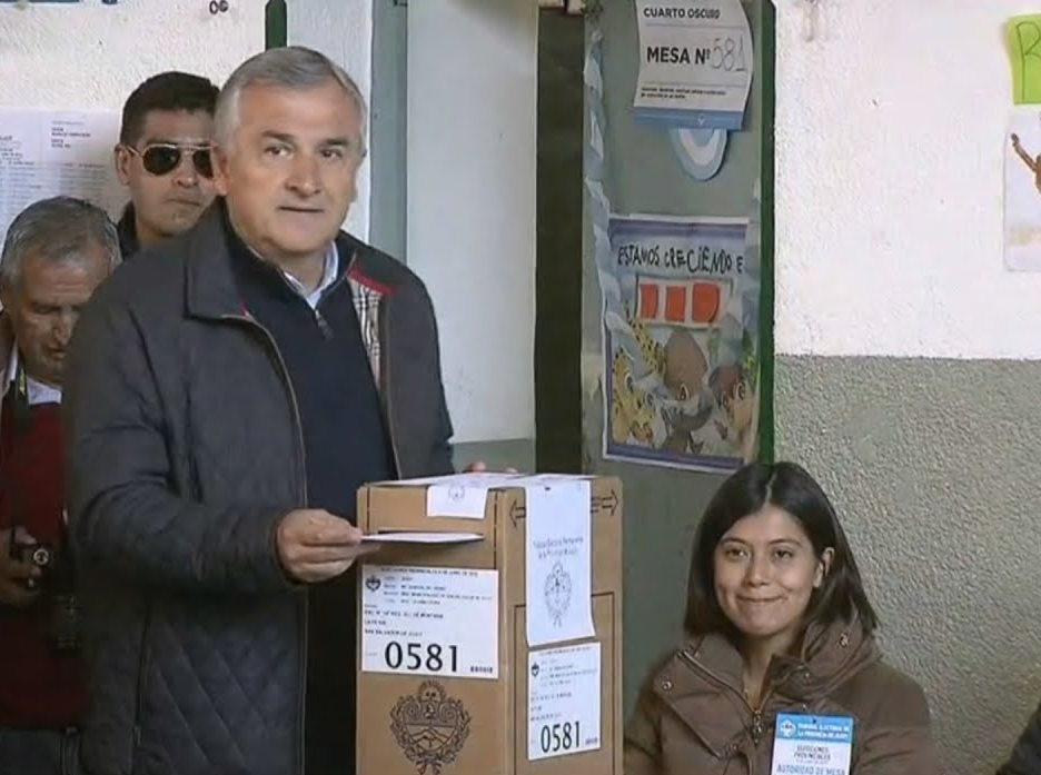 Gerardo Morales, gobernador de Jujuy (2015-2023), votando en las elecciones provinciales del de 9 de junio de 2019, en las cuales resultó reelegido para un segundo mandato.